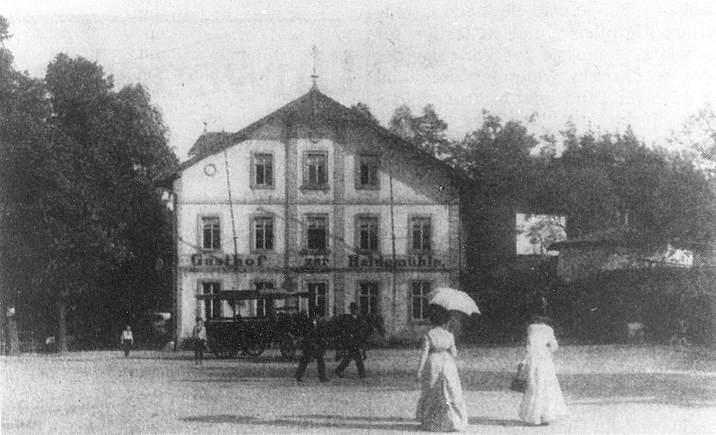 Original image description from the Deutsche Fotothek Dresden-Langebrück. Heidemühle, um 1900, aus: Die Union vom 20./21.6.1987